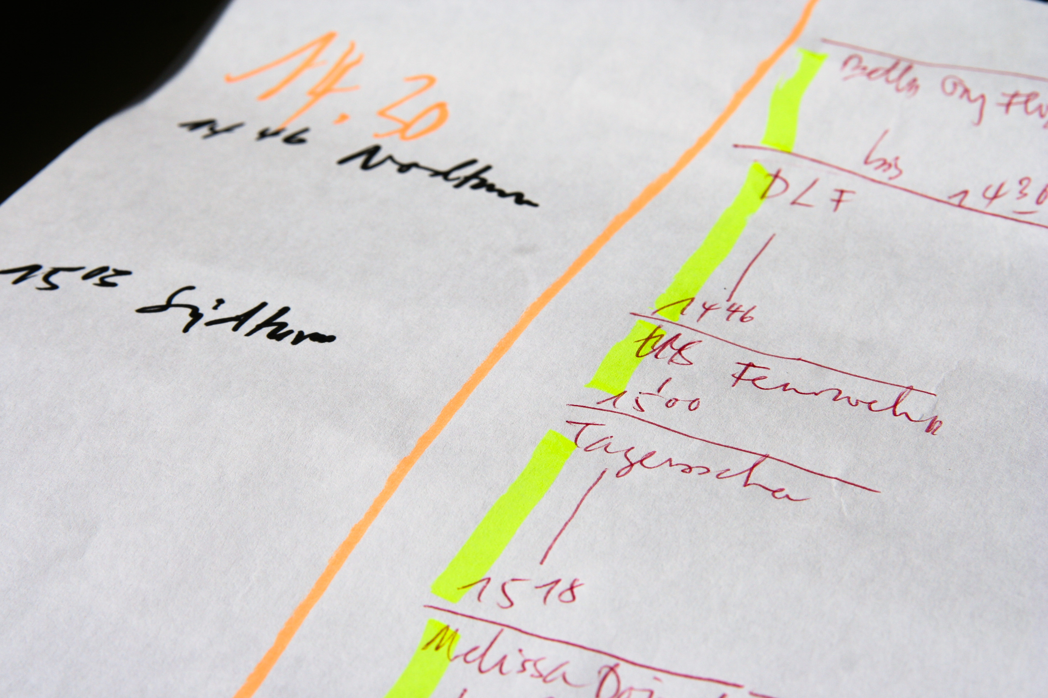 Foto eines handschriftlichen Details der Ablaufliste für das SWR 2 Archivradio; hier die Originaltöne zu einer minutengenauen Zeitleiste des 11. September 2001 - Einsturz des World Trade Centers in New York City. Dieses Papier gehört zu den Planungsunterlagen für das Archivradio, wie es ab dem 11. September 2011 bei http:/ als Internetstream laufen wird, nämlich zeitlich exakt um 10 Jahre versetzt. In dem Moment, in dem der Nordturm angegriffen wurde (14.46 Uhr MEZ), sendet das Archivradio das, was exakt 10 Jahre zuvor im Deutschlandfunk lief und schaltet dann auf den Funkverkehr der Feuerwehr von Manhattan um. Wenn der zweite Turm von einem Flugzeug getroffen wird, sendet das Archivradio den Originalton der ARD-Tagesschau, die da noch von einer kleinen Propellermaschine ausgeht und im Wesentlichen normale Nachrichten (Scharping in der Kritik, Niederlage der Sozialdemokraten in Norwegen etc.) bringt, allerdings mit zwei Live-Schaltkonferenzen nach Washington und New York. Die eigentliche Dimension der Anschläge kristallisiert sich erst später immer stärker heraus.